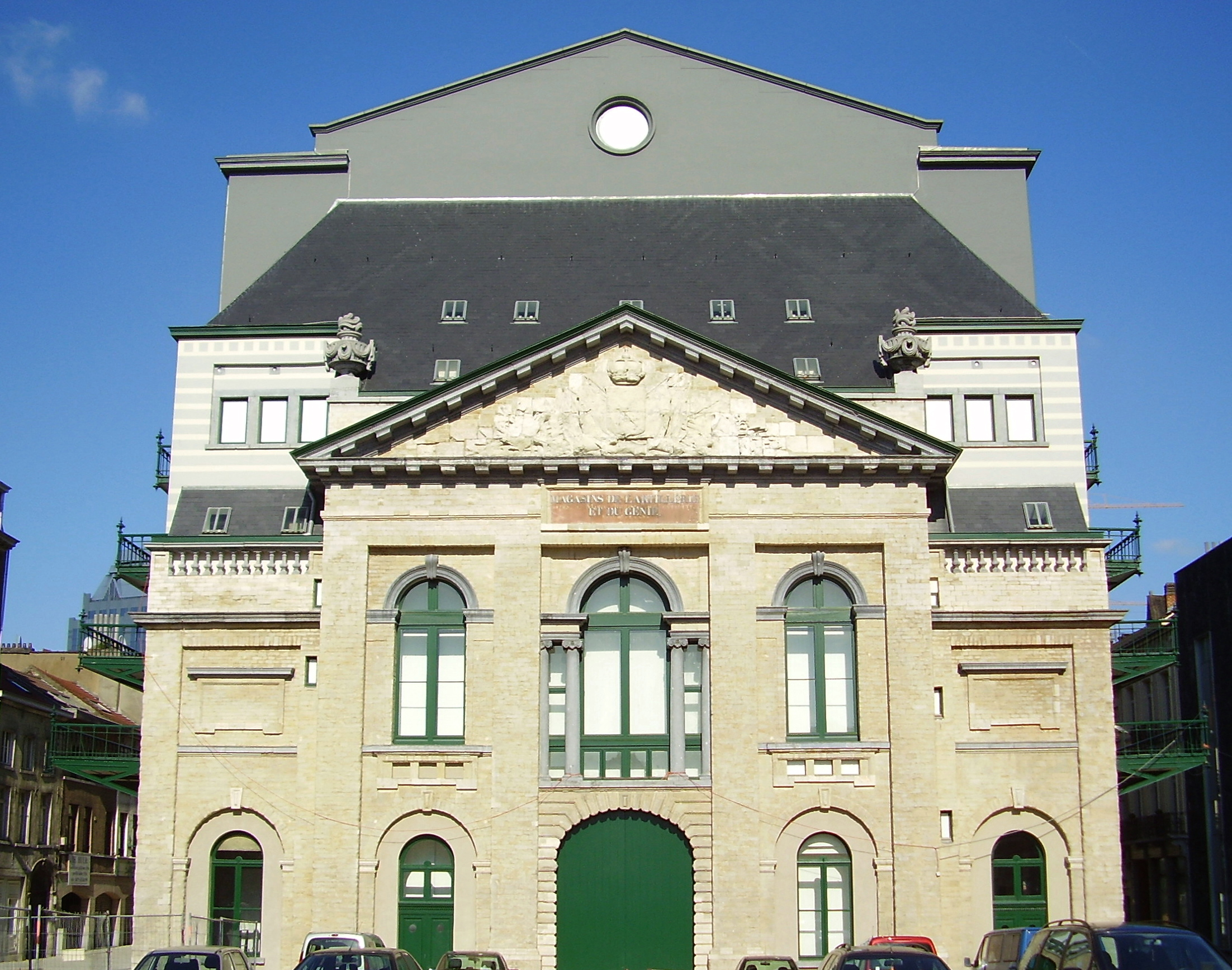 Description: Théâtre Royal Flamand(Bruxelles) - Façade de l'ancien arsenal, 06 juin 2006 Author: User:Ben2 Date of creation: 09 juin 2006 Source: Photo personnelle